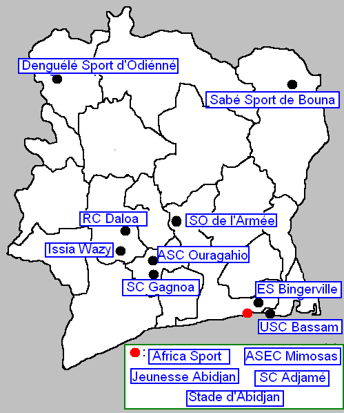 Club de football en Coôte d'Ivoire. source : oeuvre personnelle